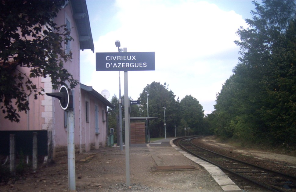 La gare de Civrieux-d'Azergues